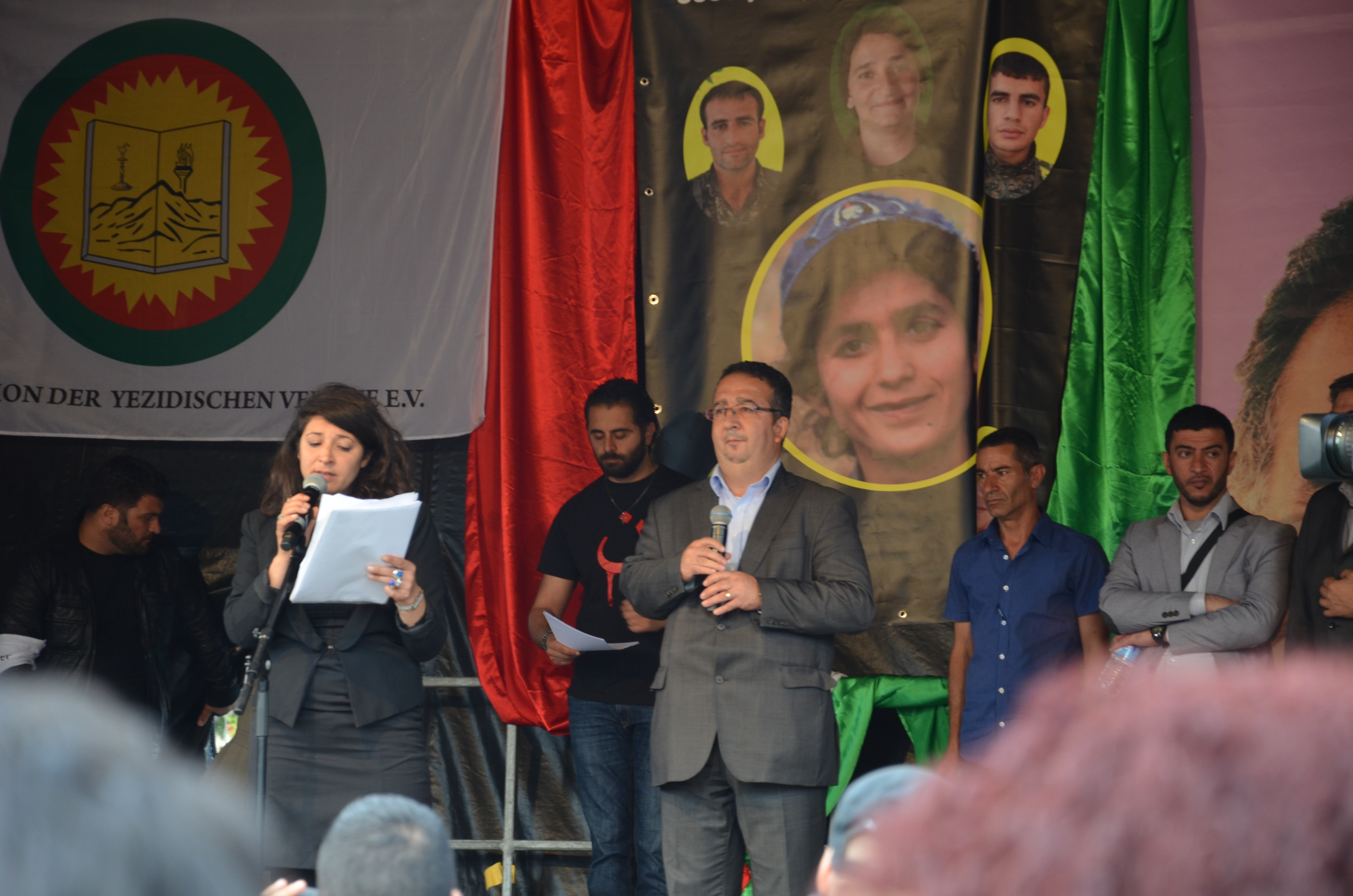 Für Hilfe gegen den Terror der Gruppe Islamischer Staat (IS) demonstrierten am Samstag, den 17. August 2014 rund 11.000 Jesiden, Kurden, Aleviten und andere in Hannover. Die Kundgebung auf dem Waterlooplatz und der Demonstrationszug durch die Innenstadt der niedersächsischen Landeshauptstadt verlief nach Angaben der Deutschen Presse-Agentur und zahlreicher anderer Medien wie der Hannoverschen Allgemeinen Zeitung "äußerst friedlich". Teilnehmer waren unter anderem die Alevitische Gemeinde Deutschland e.V. sowie ... Organisatoren (Veranstalter) waren unter anderem die FÖDERATION DER YEZIDISCHEN VEREINE E.V., der aus Celle angereiste Yilmaz Kaba sowie ...